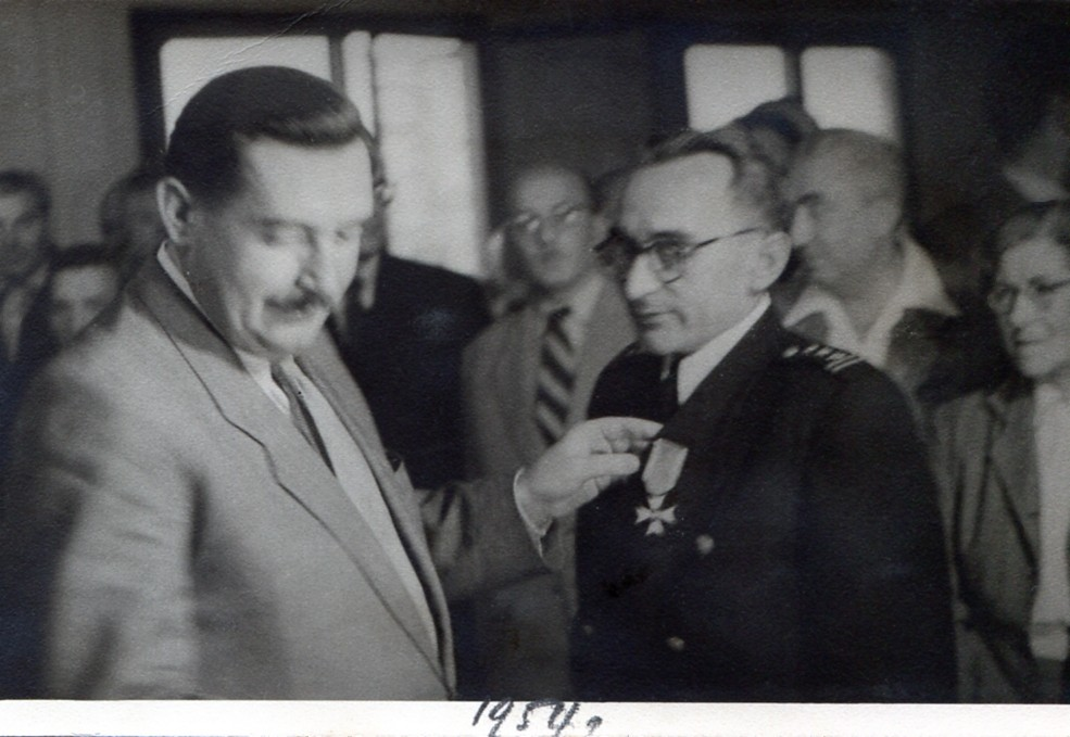 Председатель СМ ПНР, 1-й секретарь ЦК ППР Болеслав Берут вручает государственную награду ПНР Гронтковскому А.Д.